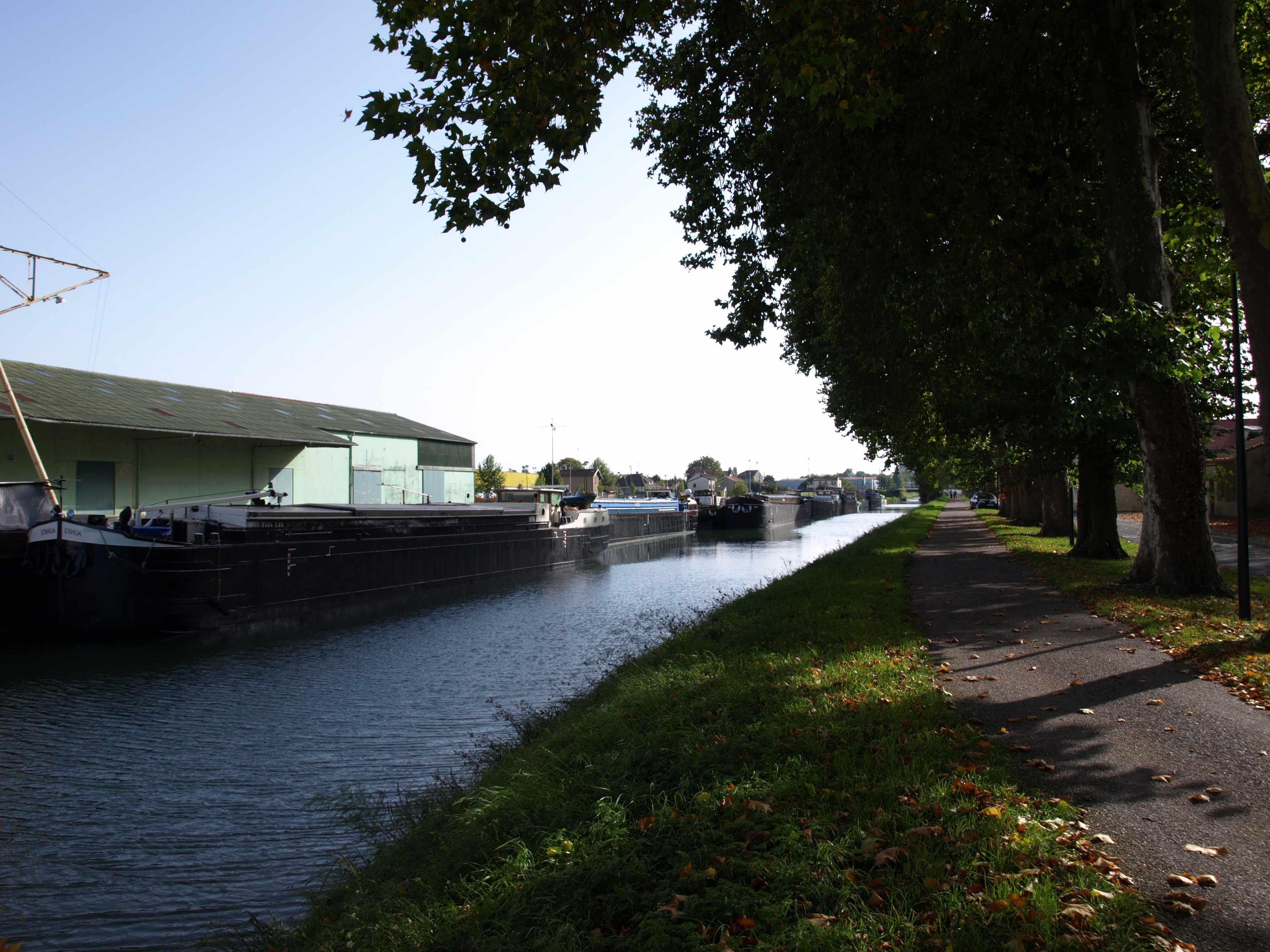 Vitry-le-François (51300 - FRANCE) : photographies Canal de la Marne à la saône et le pont.